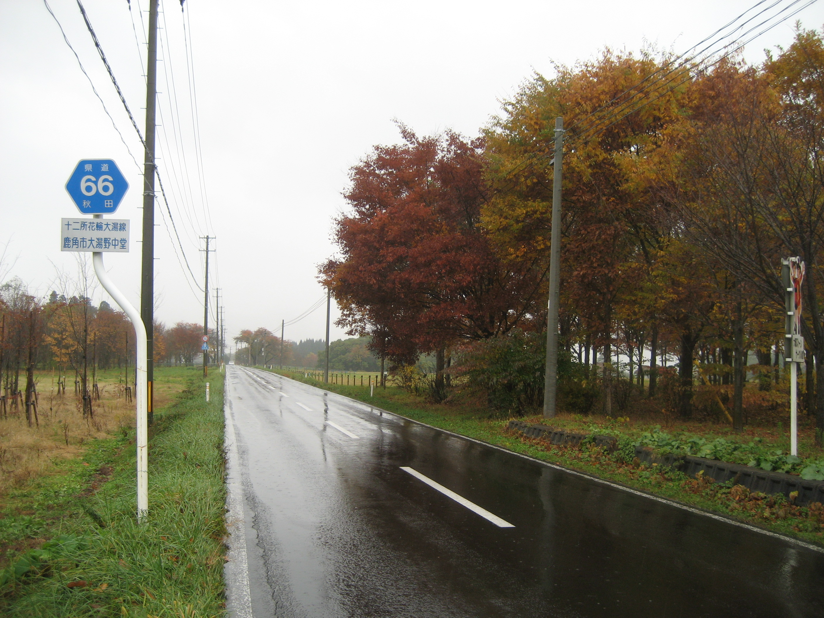 秋田県道66号線鹿角市野中堂付近